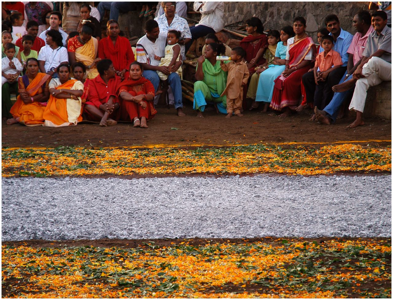 Des hindous réunionnais attendant la marche sur le feu.